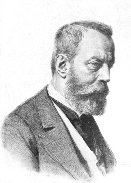 Károlyi-Nagy Károly, Aloys Graf (1825 - 1889)